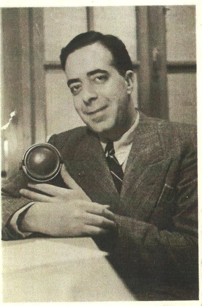 Pio Ambrogetti con microfono.